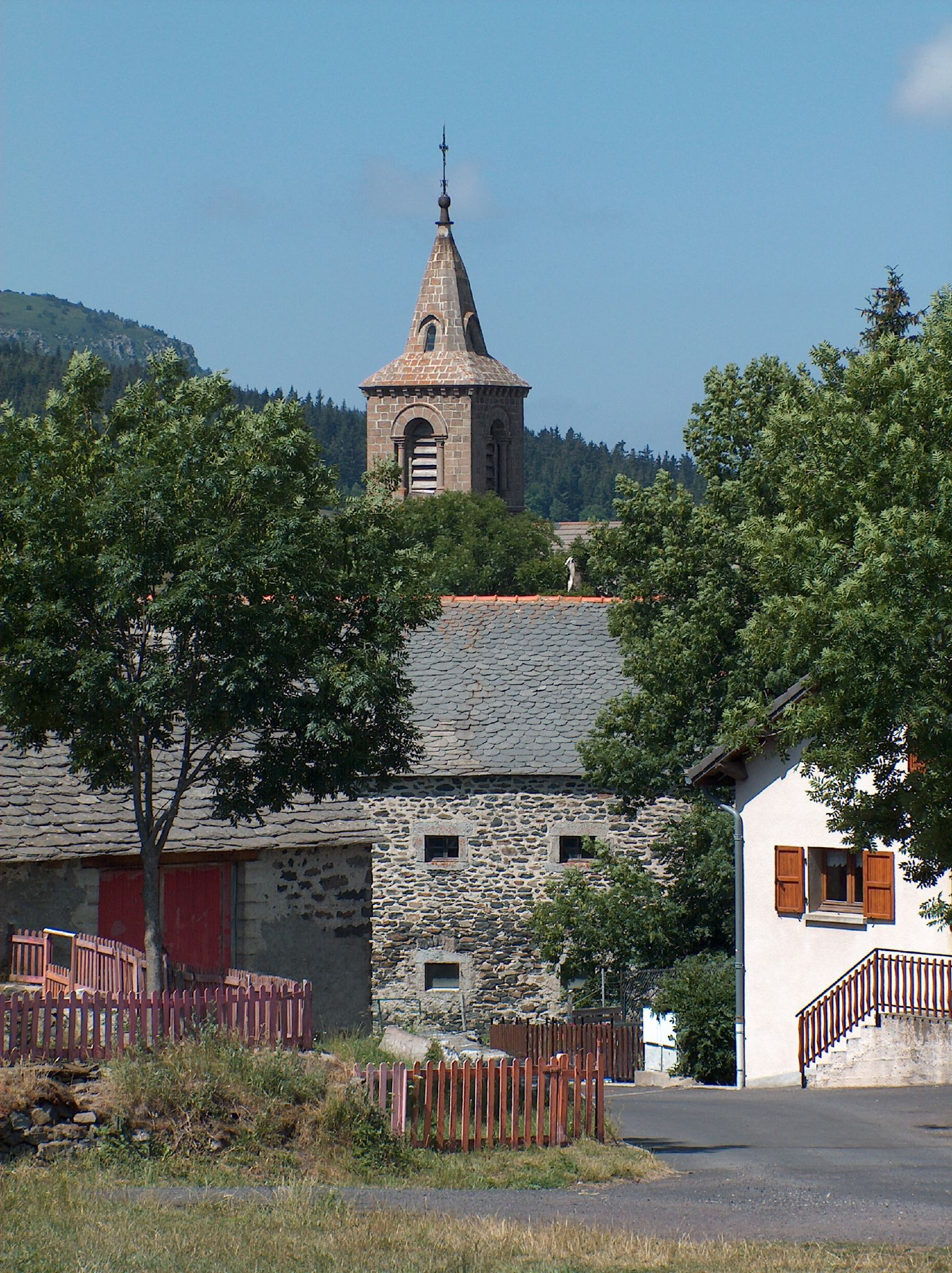 Église des Estables